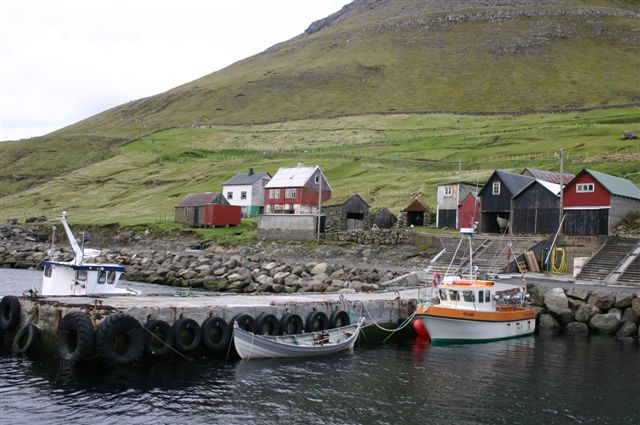 Sydradalur, Kalsoy